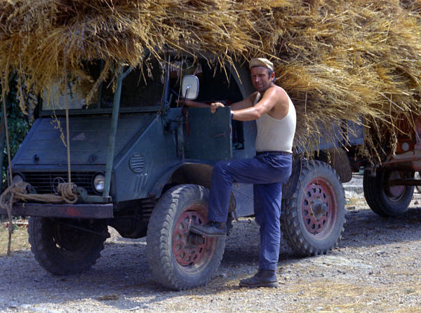 Unimog 401 beim Laden von Getreide (ohne Ortsangabe)